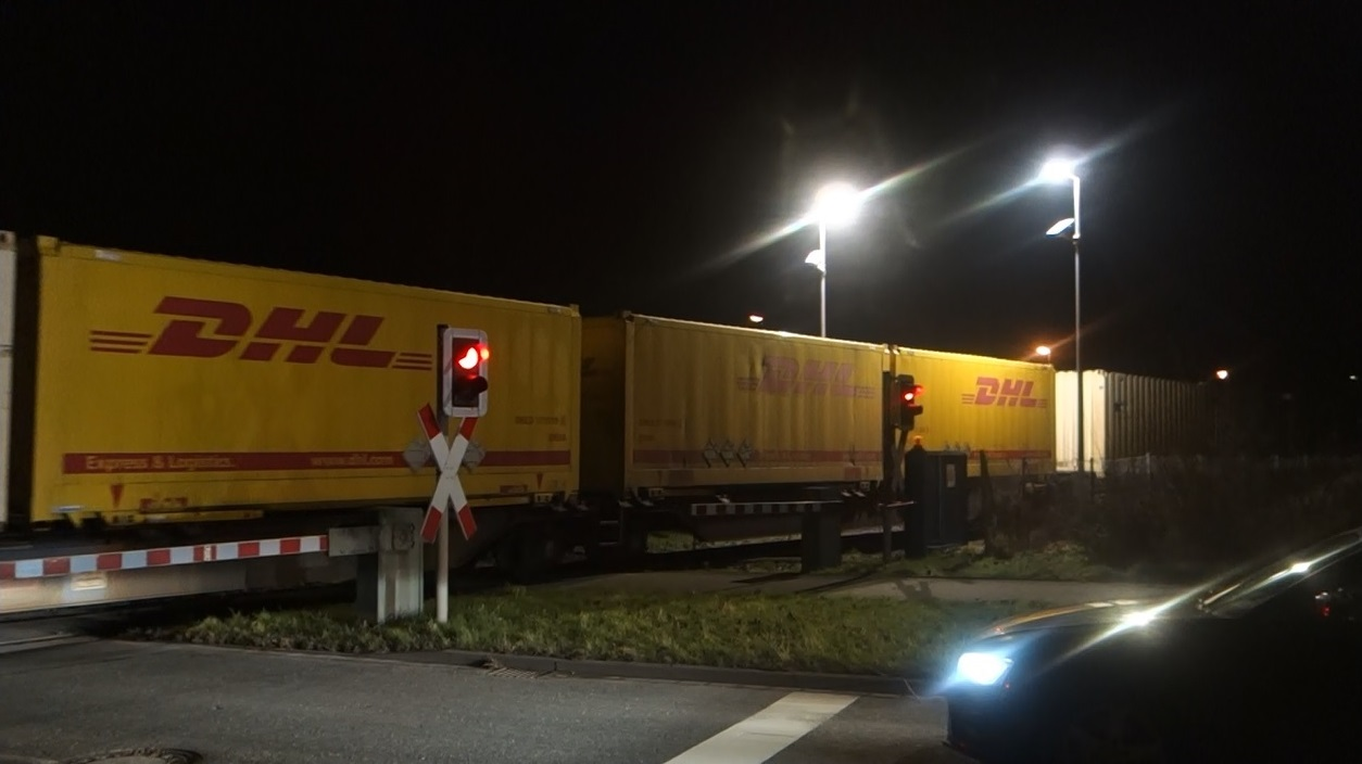 Ausfahrt des als "Parcel Intercity" bekannten Zuges nach Berlin aus dem Gelände des DHL-Logistikzentrums in Unna-Königsborn; ab Hamm (Westfalen) wird der Zug elektrisch bespannt. Seine offizielle Bezeichnung lautet KT 50007; KT = Zug des Kombinierten Verkehrs zwischen Terminals.